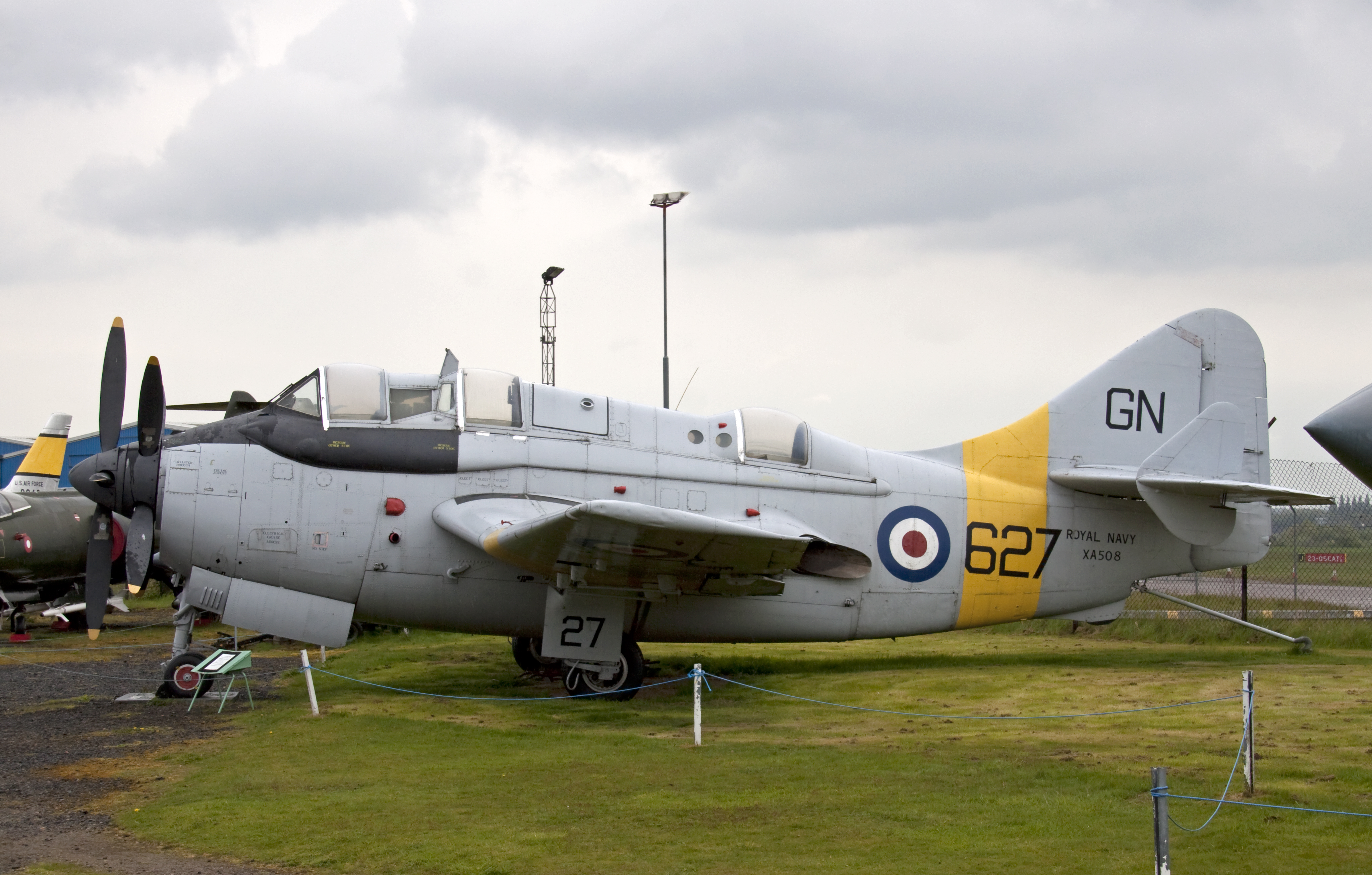 Fairey Gannet